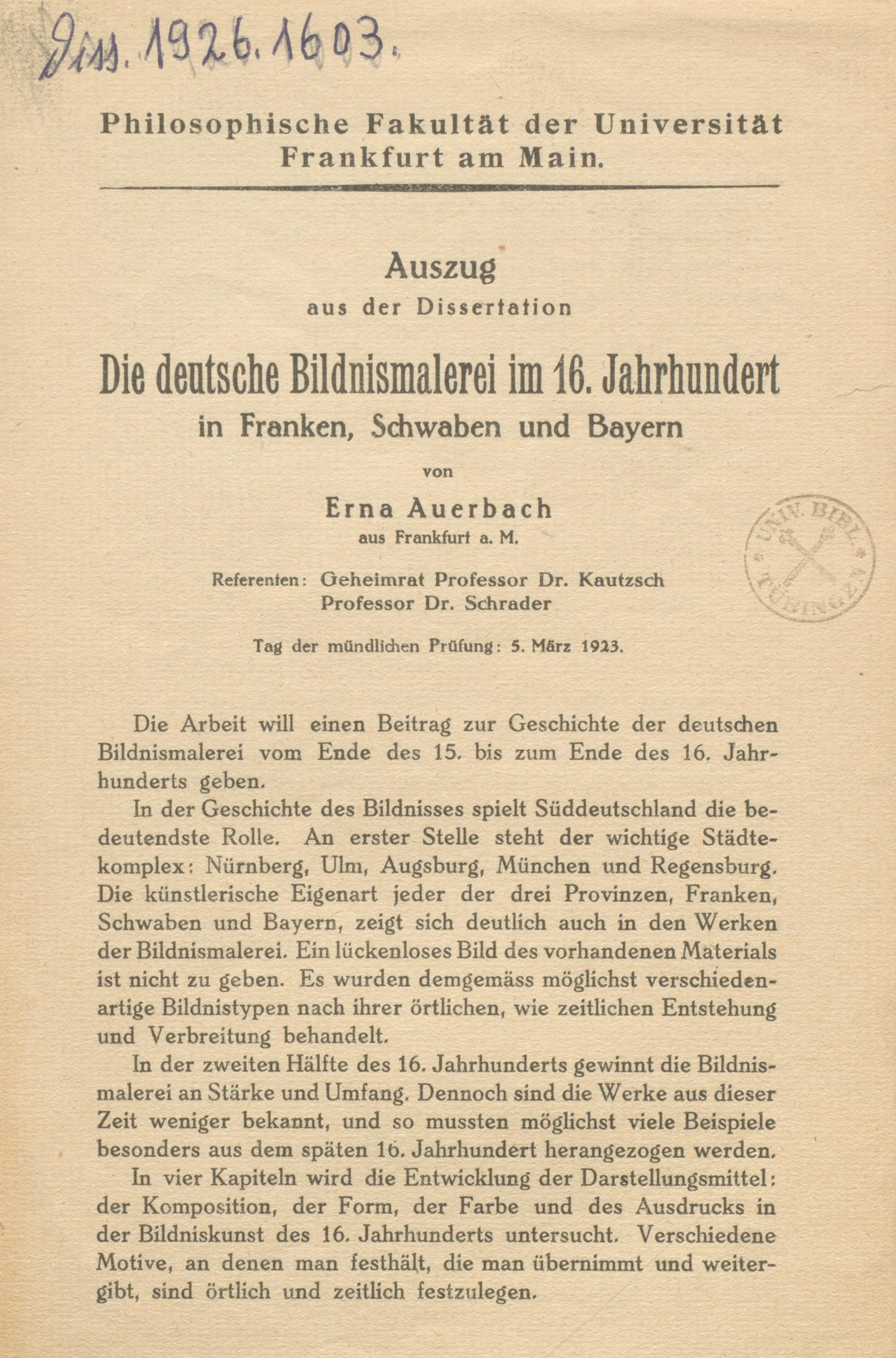 Erna Auerbach Dissertation Auszug 1925